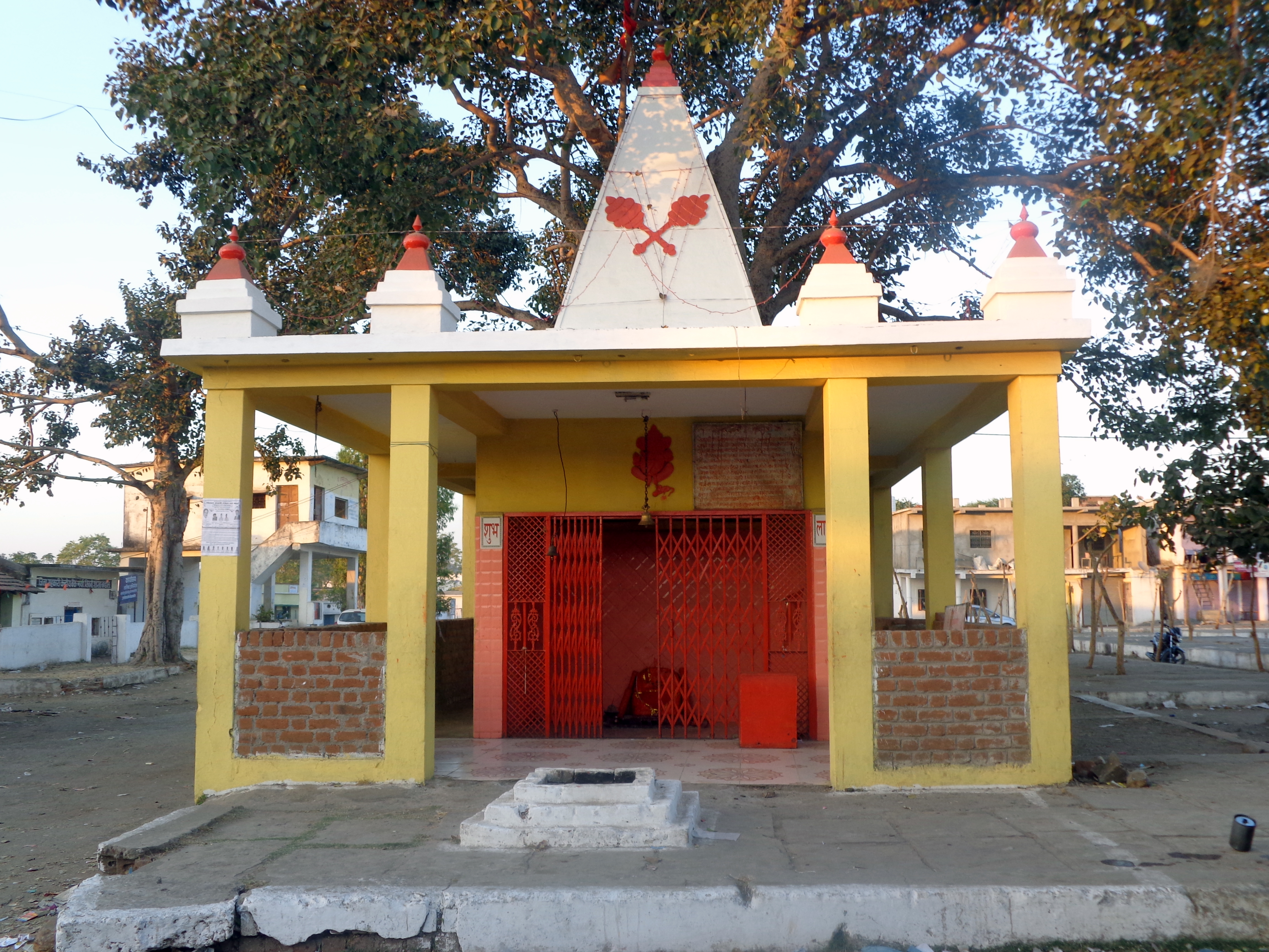 hi:बंडोल: यात्री प्रतिक्षालय स्कूल के पास